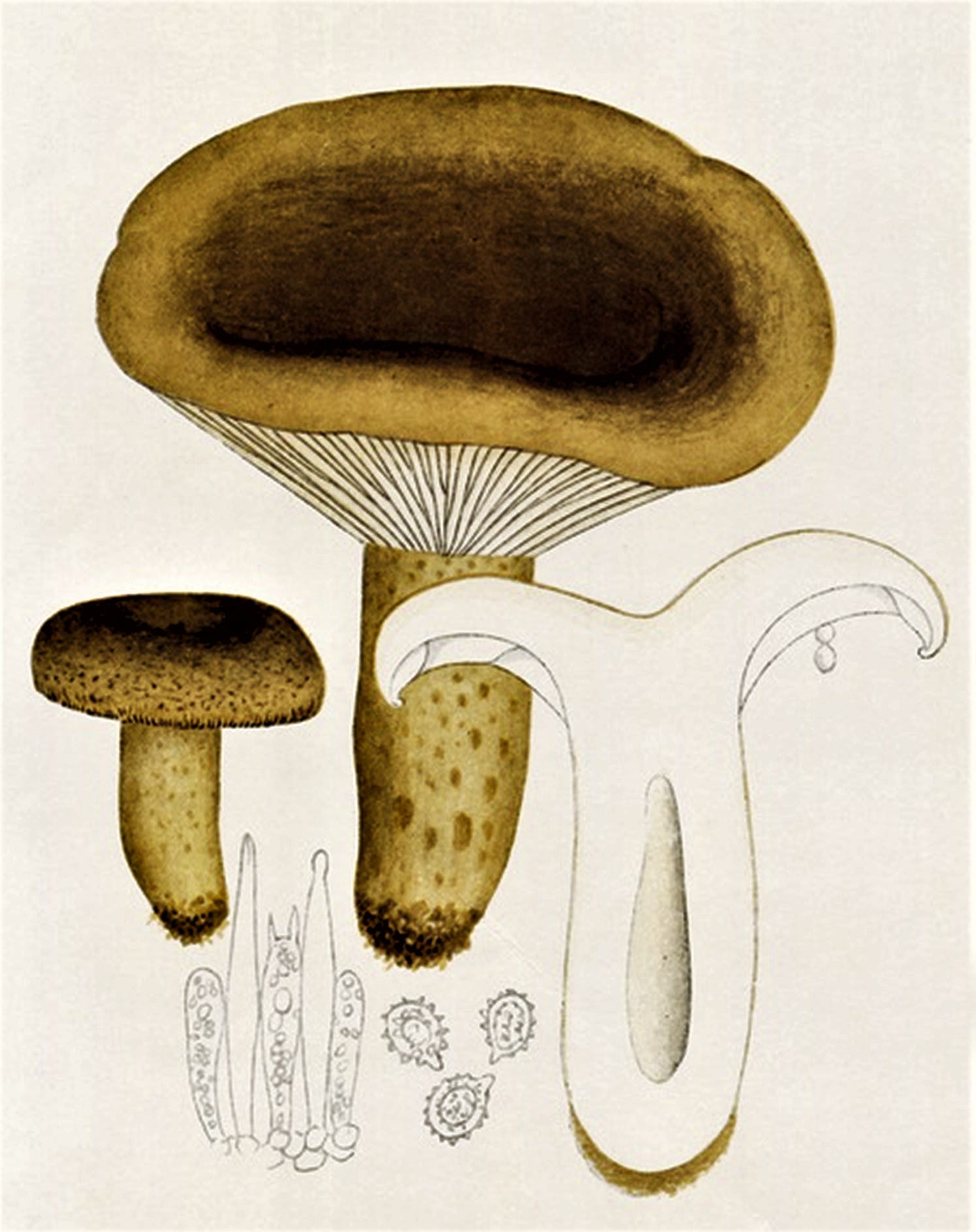 Bres.: Weinm., 1828) Fr. (1838)